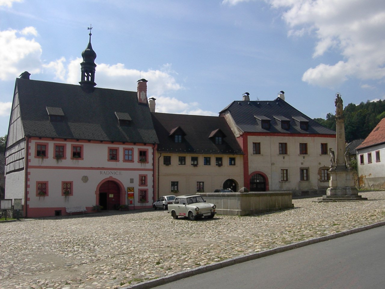 Town hall in village Utery, Czech Republic. Budova obecního úřadu a pošty v Úterý.